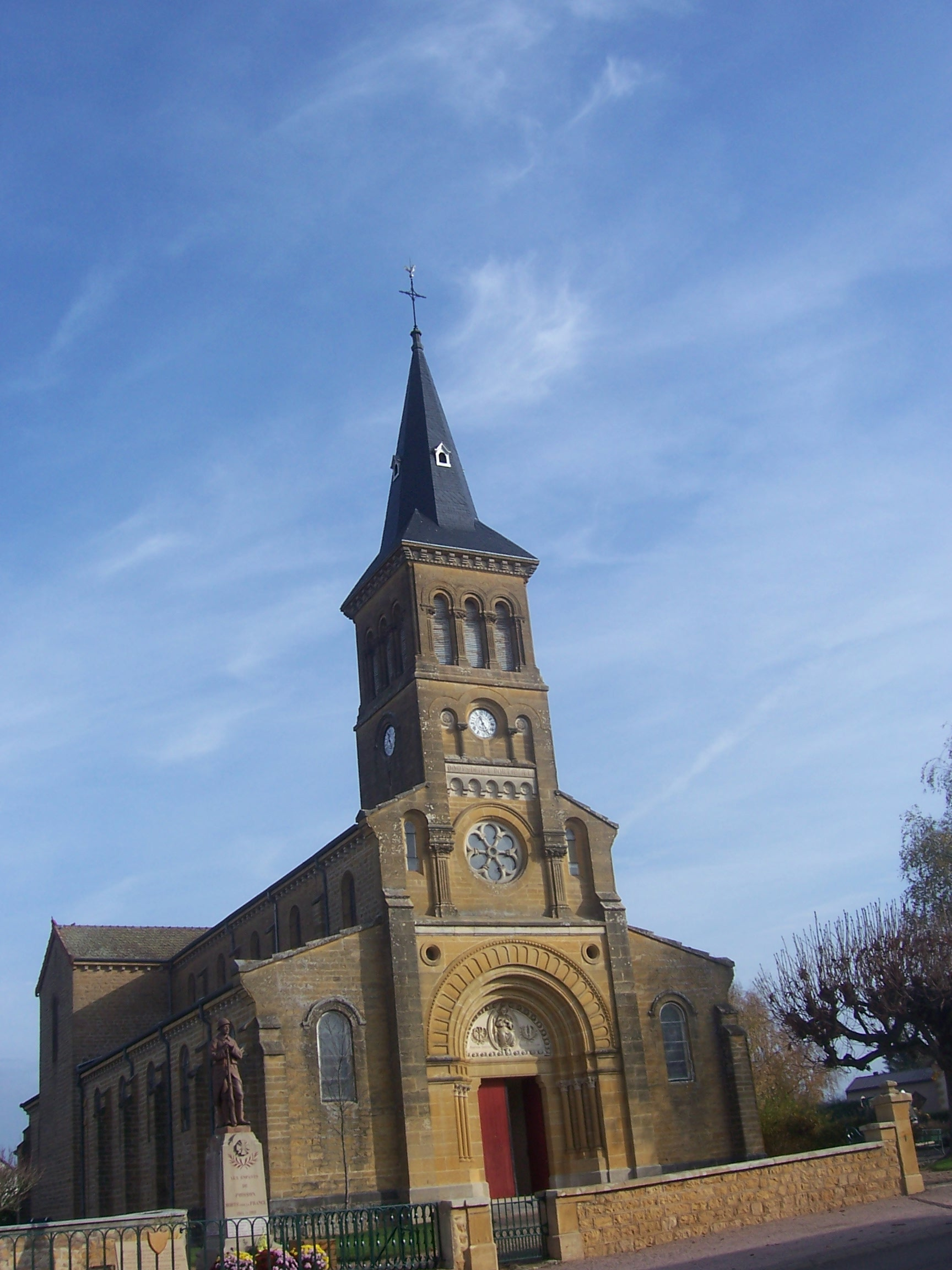 Eglise de Poisson